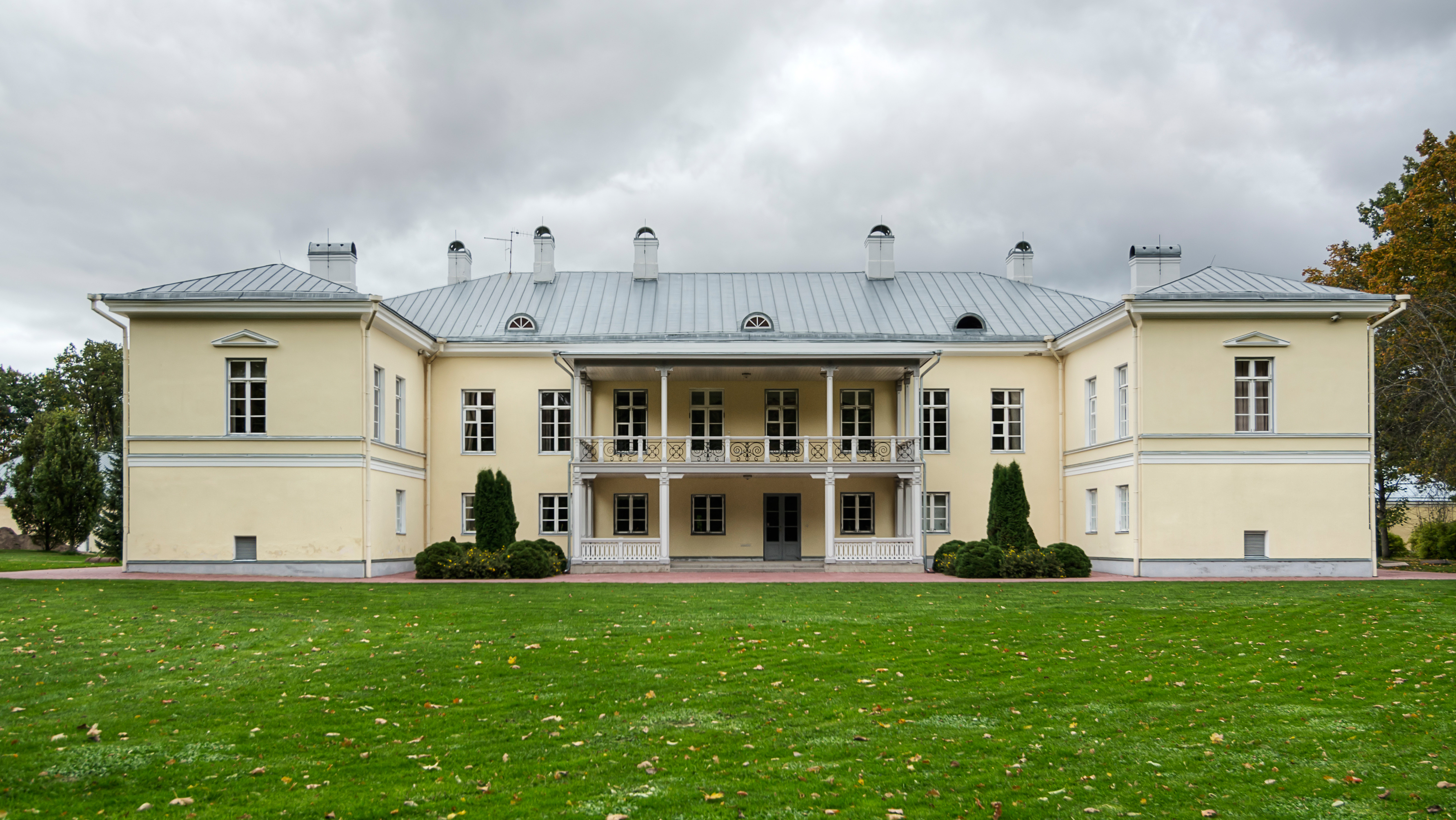 Mäetaguse mõisa peahoone. Hoonet kasutab Mäetaguse vallavalitsus